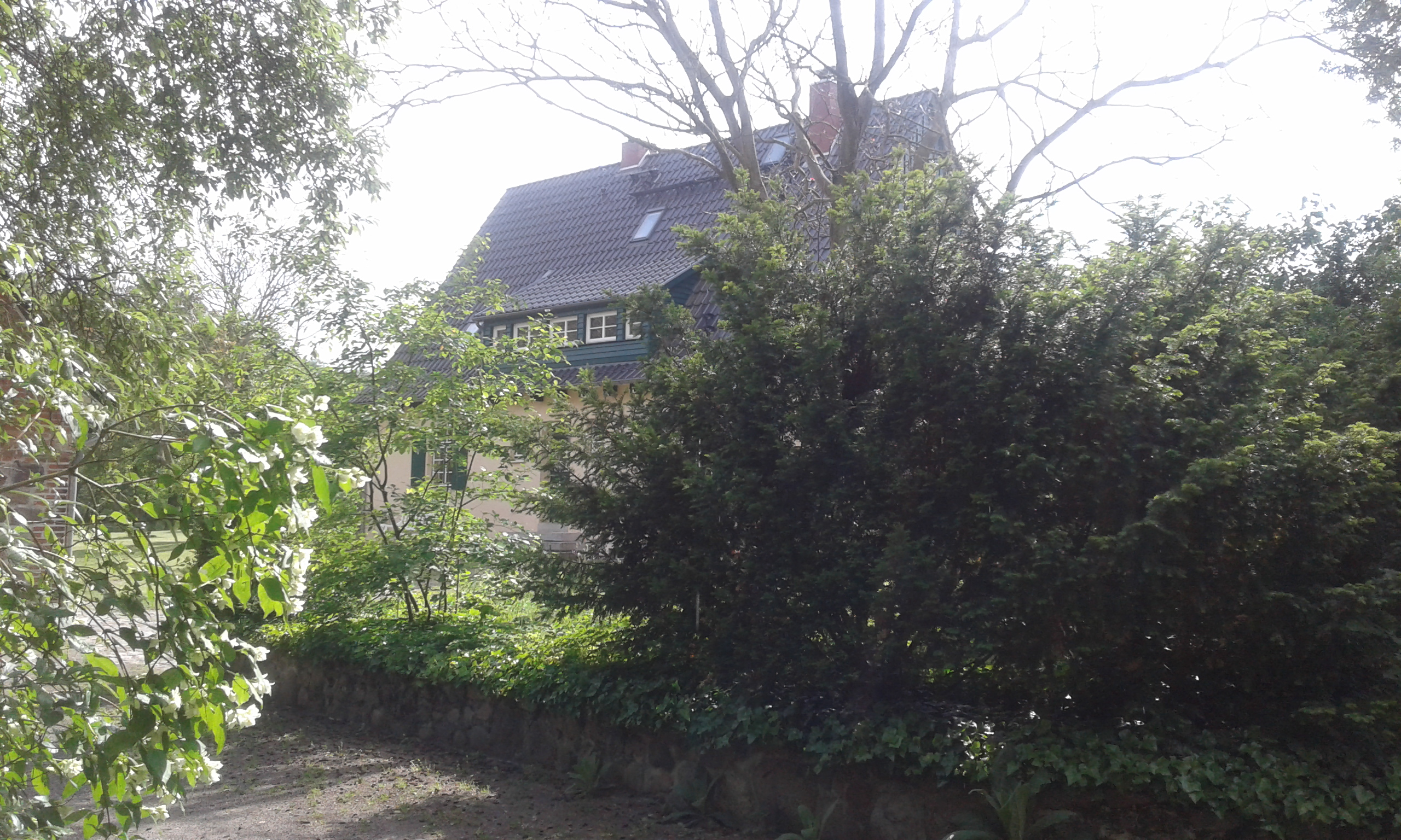 Forsthaus